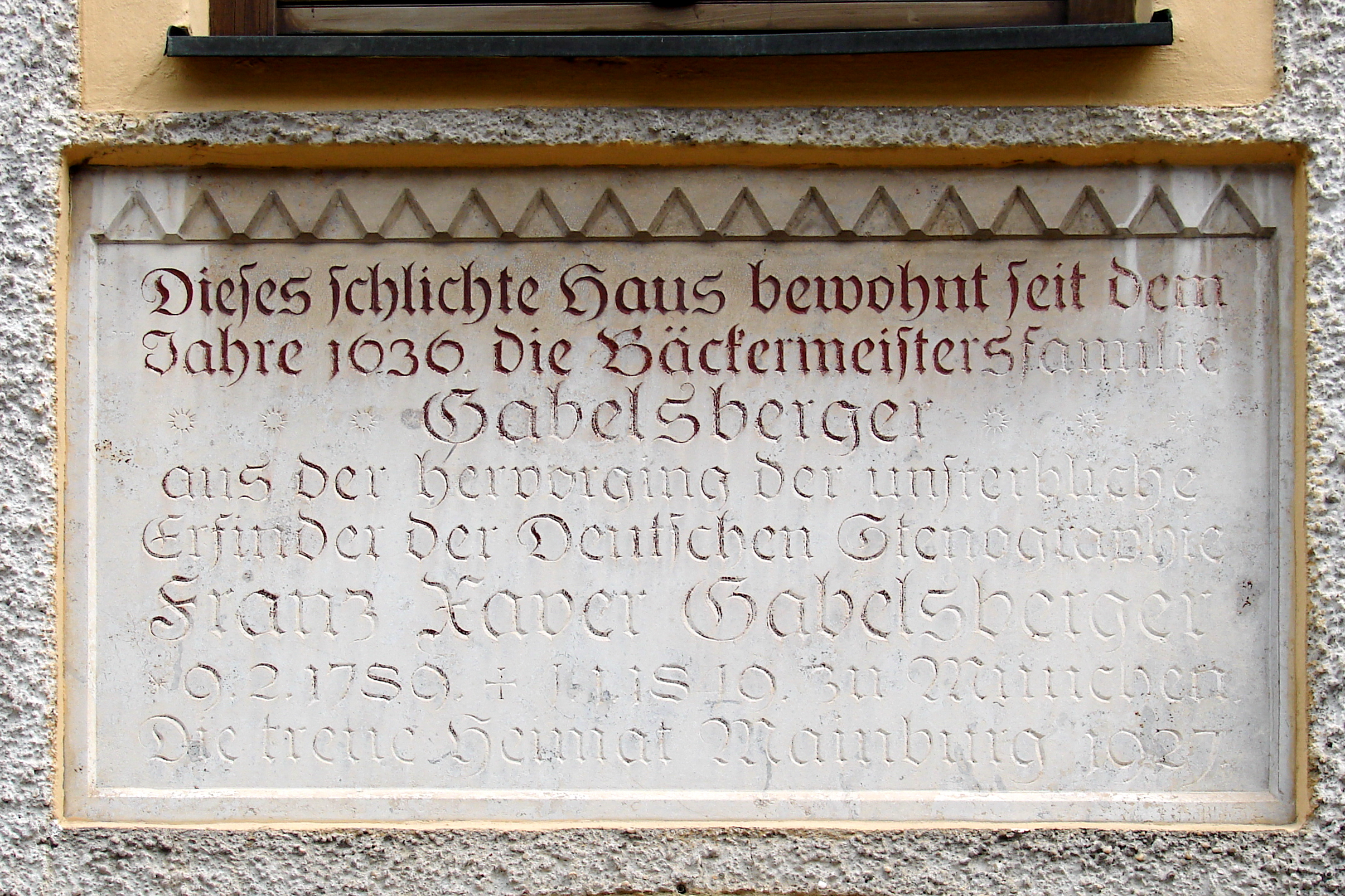 Wohnhaus und Bäckerei, Stammhaus der Familie des Stenografen Franz Xaver Gabelsberger, zweigeschossiger Steildachbau mit Aufzugsarm und Aufzugsluken, um 1636; Rückgebäude, eineinhalbgeschossiger. Walmdachbau über unregelmäßigem Grundriss, wohl 1636.